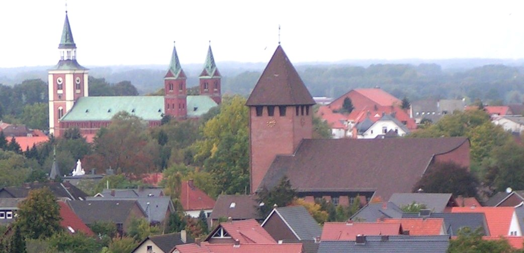 St. Josef und St. Gertrud in Lohne, vom Aussichtsturm aus gesehen